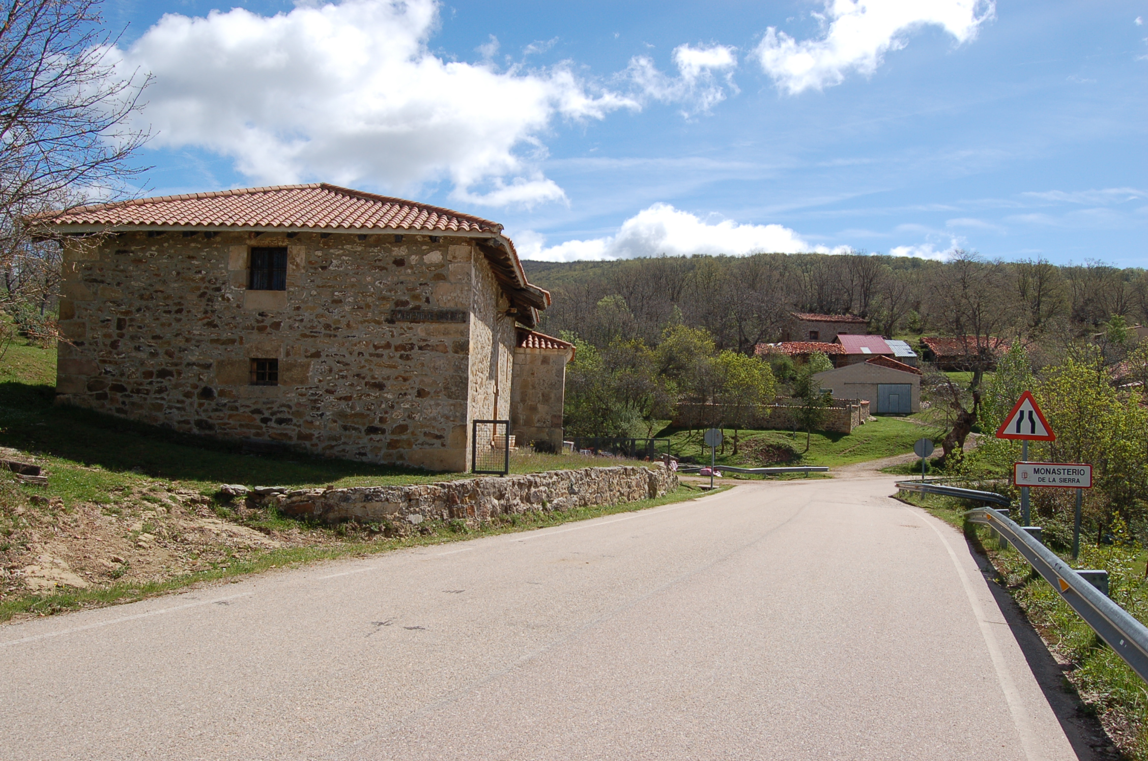 Monasterio de la Sierra, carretera BU-V-8226